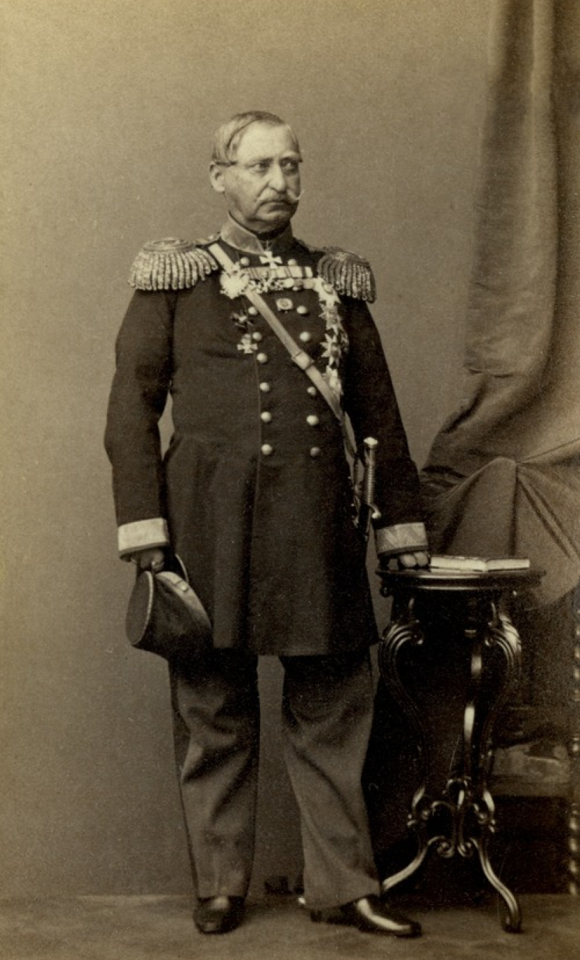 Бебутов, Давид Осипович (арм.Բեհբության Դավիթ Հովսեփի (1793—186)) — князь, русский генерал-лейтенант, участник (1817—1864) Кавказских походов и Крымской войны.